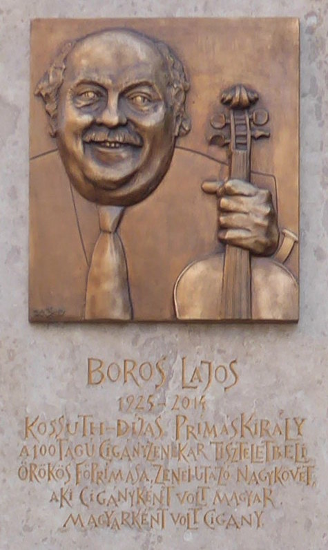 Boros Lajos (1925–2014, más néven Boross Lajos) emléktáblája, Muzsikus cigányok parkja, Budapest, VIII. kerület. Felirata: „Boros Lajos 1925–2014, Kossuth-díjas prímáskirály, a 100 Tagú Cigányzenekar tiszteletbeli örökös főprímása, zenei utazó nagykövet, aki cigányként volt magyar, magyarként volt cigány.” A fényképet 2017-11-04-n készítettem.